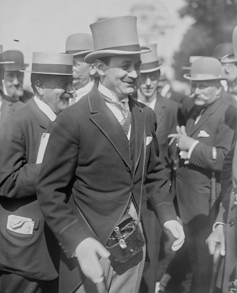 11-6-22, Chantilly, M. Marcel Boussac (propriétaire du cheval gagnant le Prix du Jockey Club) - (photographie de presse) - (Agence Rol)